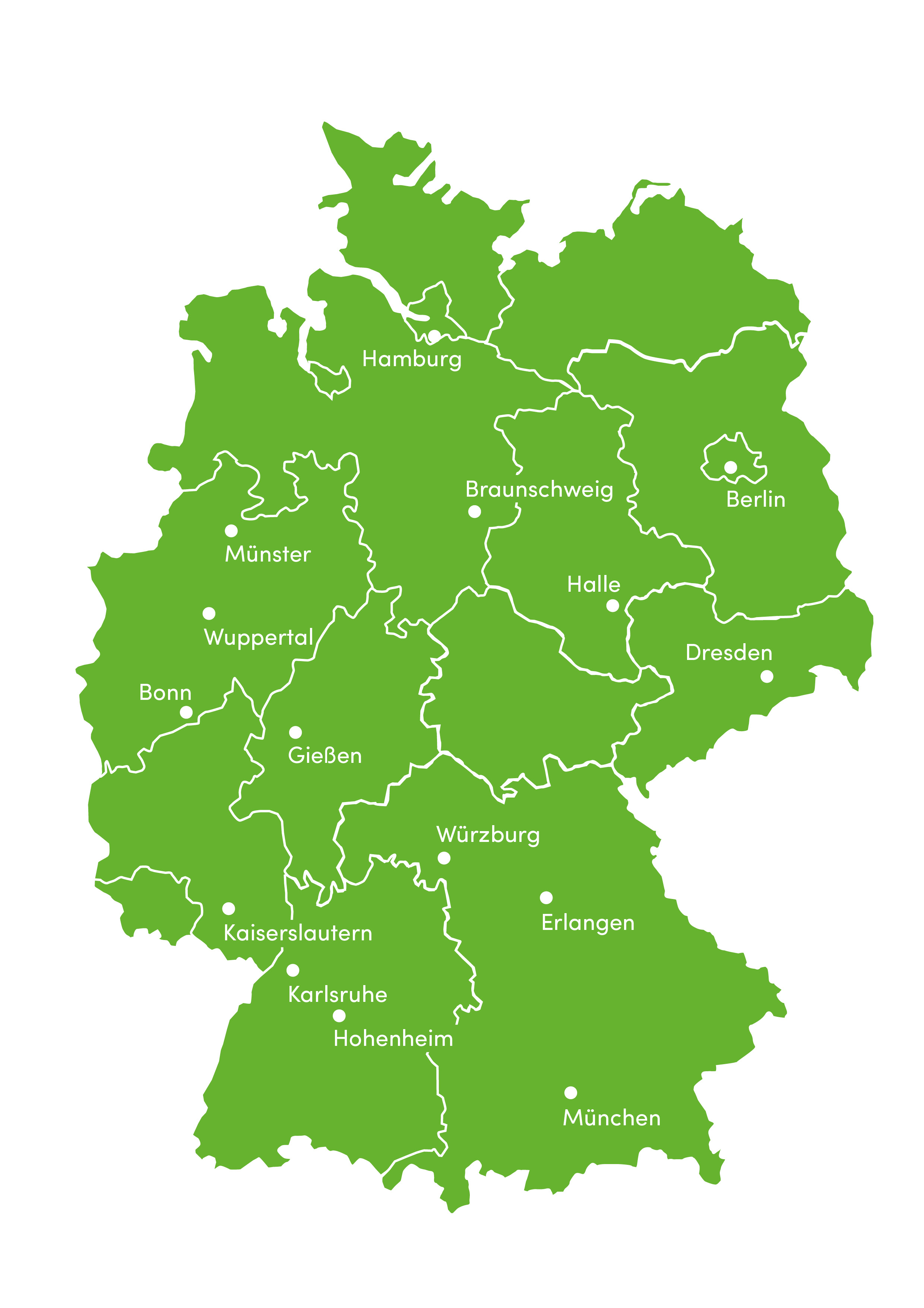 Universitätsstandorte in Deutschland an denen Lebensmittelchemie gelehrt wird.